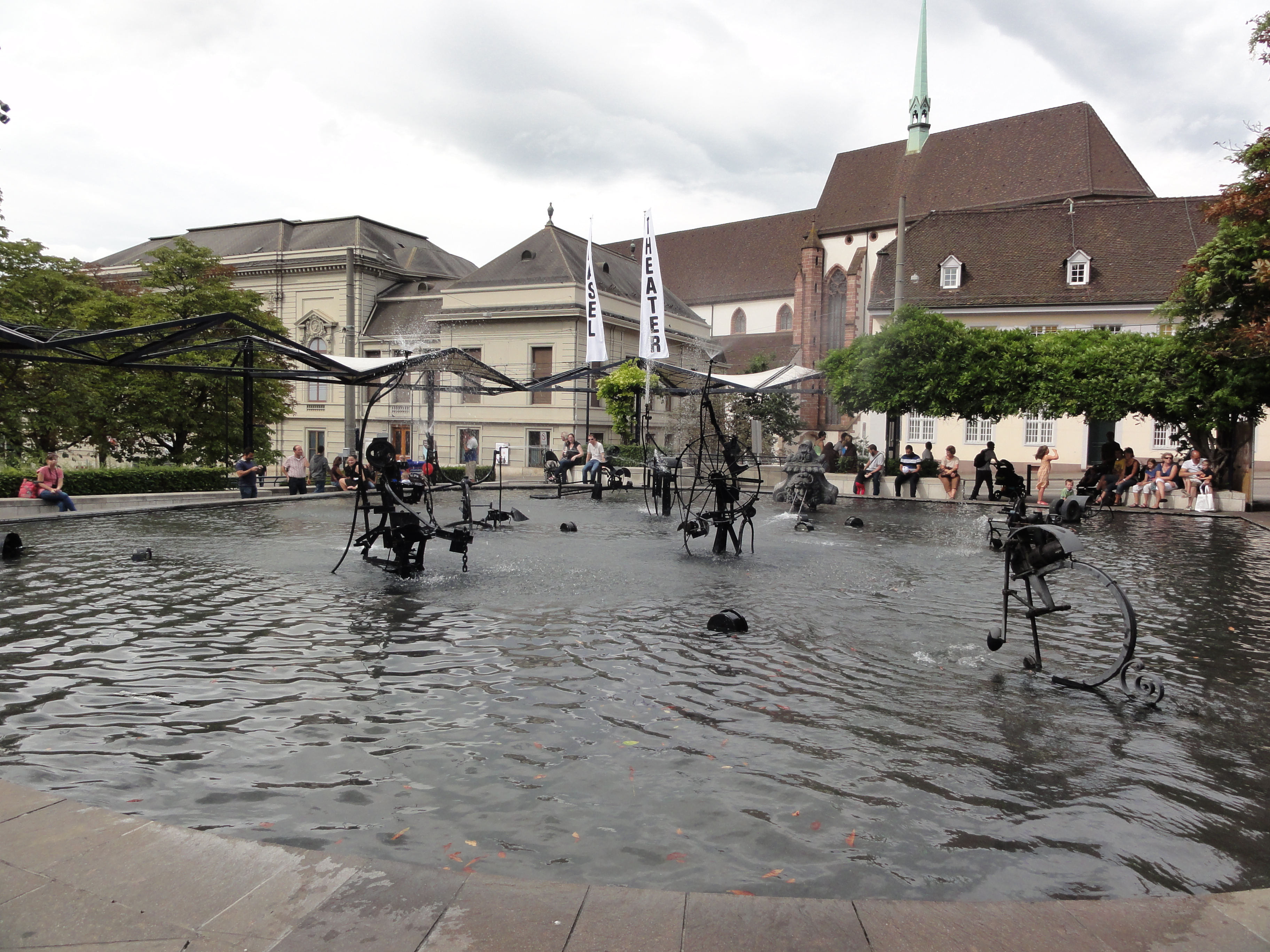 Basel BS — Tinguely-Brunnen Info GPS data may be inaccurate. EXIF data regarding date and time may be inaccurate.